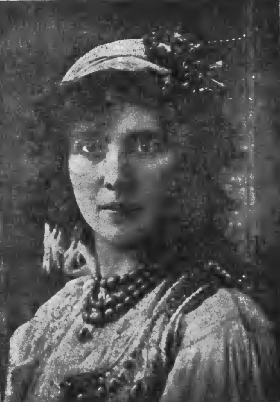 Zofia Atteslander